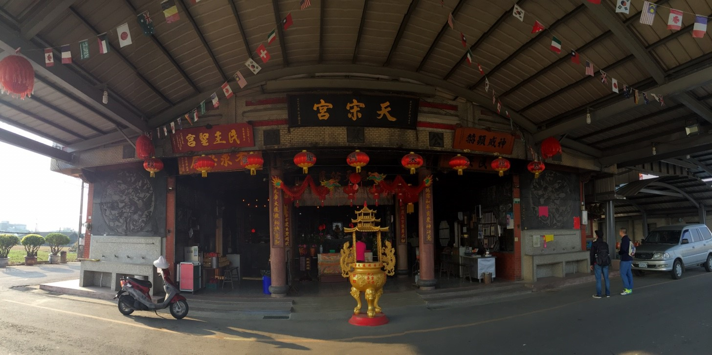 中文（台灣）: 建於溪口游東村的天宋宮正面照